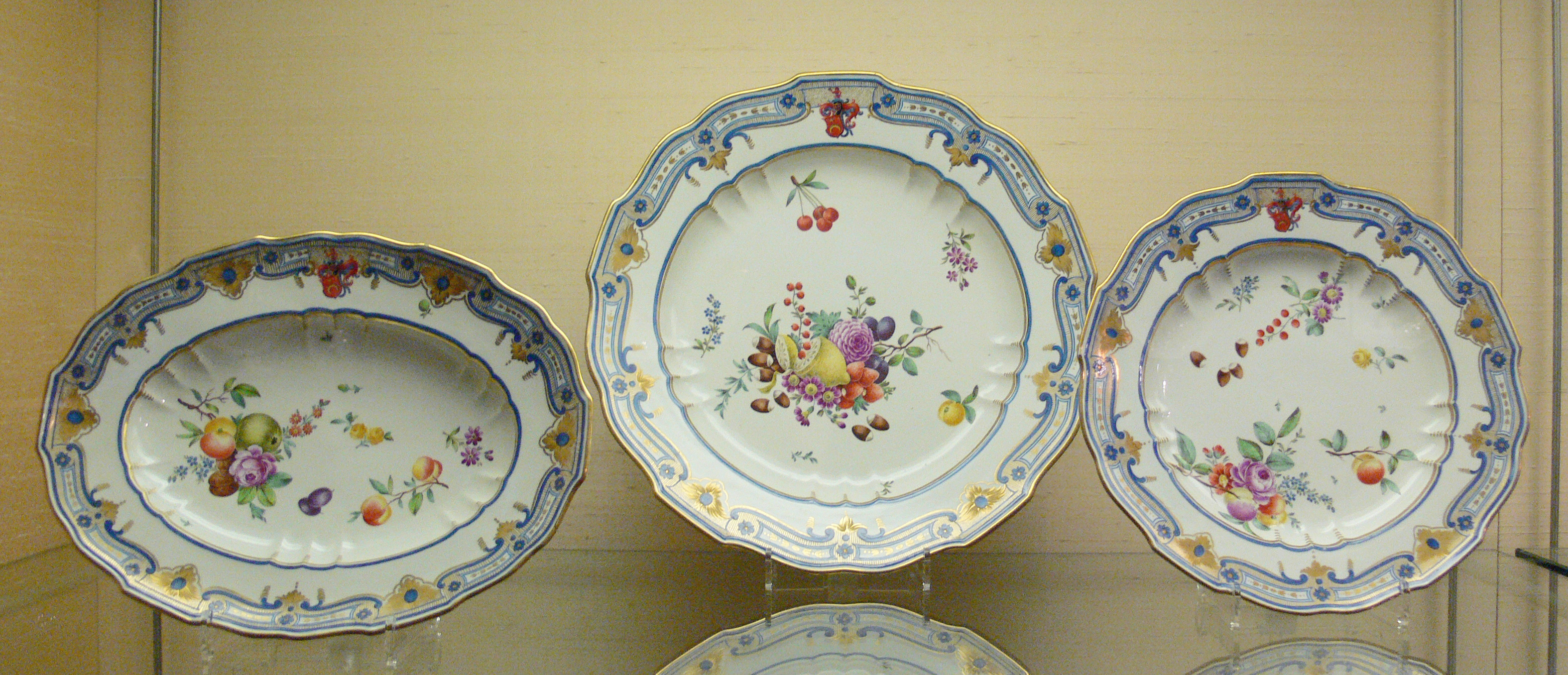 Teller aus dem Speiseservice für Johannes von Jenner, Porzellan/Muffel-Technik; Frankenthal (Marke: CT mit Kurhut), um 1782 Gallery: Reiss-Engelhorn-Museen, Mannheim